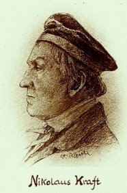 Nikolaus Kraft violoncellista a hudební skladatel